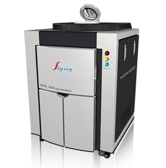 Волнодисперсионный спектрометр